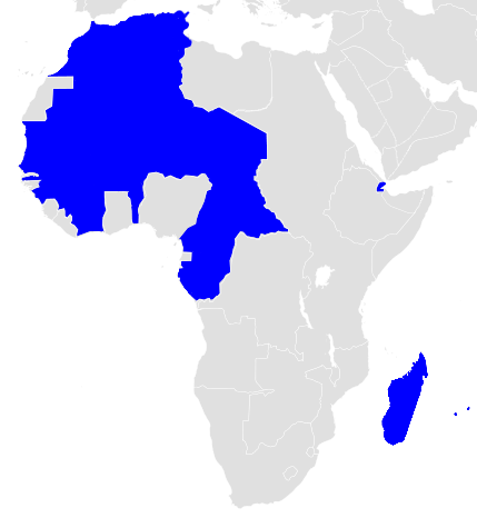 Французские владения в Африке (1920 г)